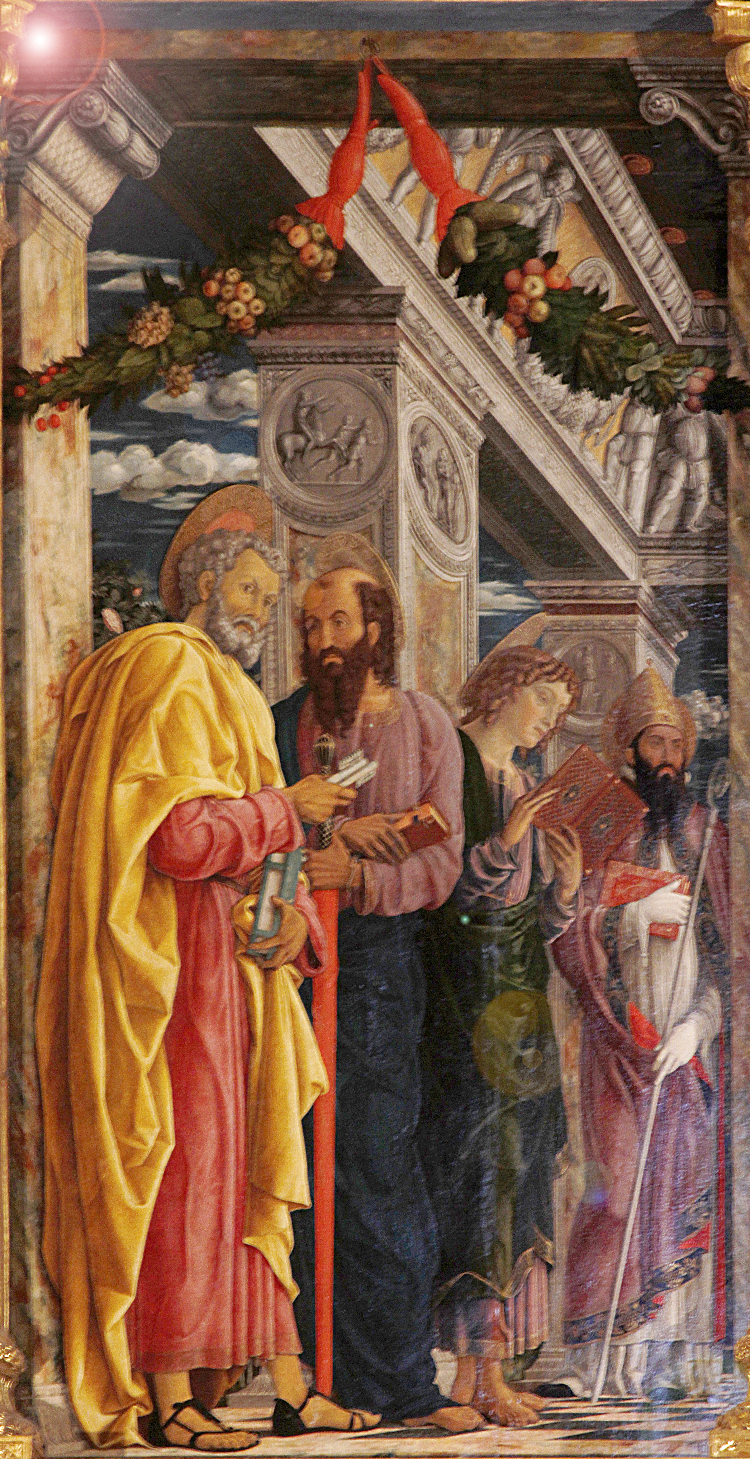 Pala di San Zeno by Andrea Mantegna - San Zeno - Verona